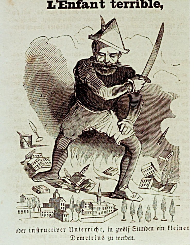 "Bismarck als Stadtzerstörer", in: Kladderadatsch Nr. 13, 1852